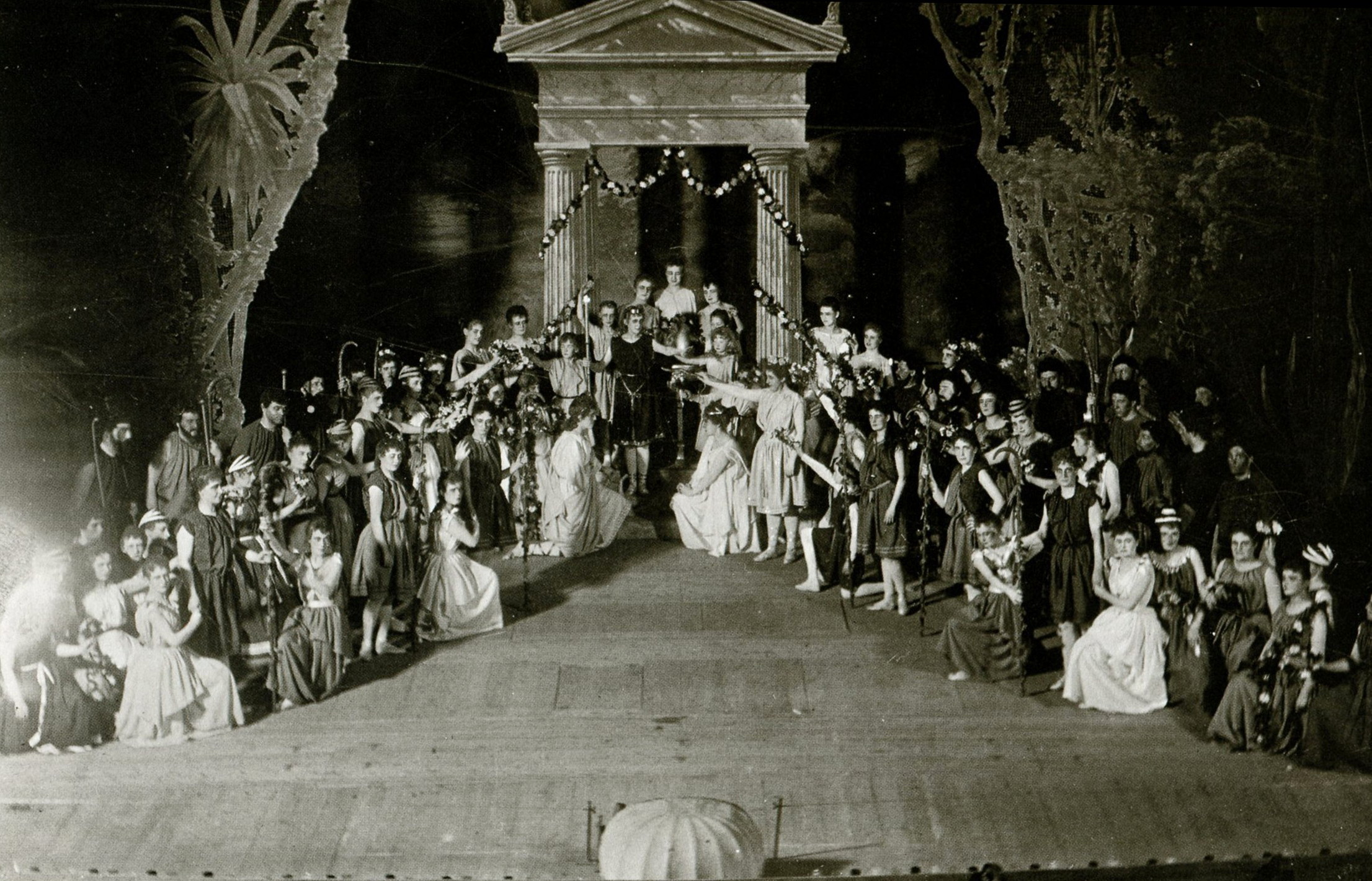 Blixtfotografi från Glucks "Orfeus", fotograf Valentin Wolfenstein